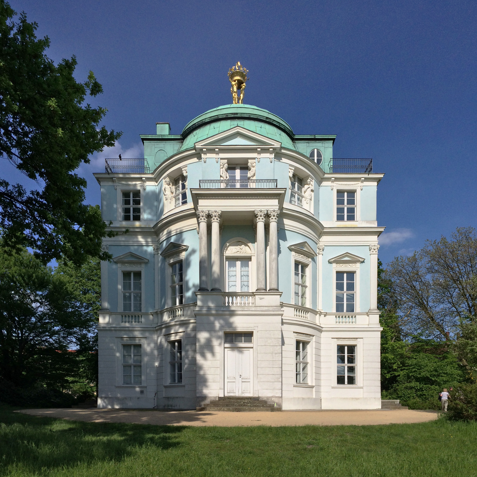 Belvedere im Schlosspark Charlottenburg, 1788–1789, Carl Gotthard Langhans